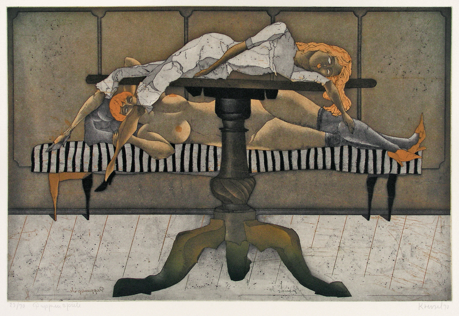 Dieter Kressel, Farbradierung -Puppenspiele- 1970